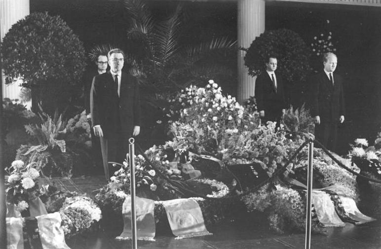 Zentralbild-Koch-Eckleben Sä. 3.8.1962 Trauerfeierlichkeiten zu Ehren von Prof. Konwitschny Nationalpreisträger Prof. Dr. h.c. Franz Konwitschny, Gewandhauskapellmeister und 1. Generalmusikdirektor der Deutschen Staatsoper Berlin, wurde am 2.8.1962 in Leipzig feierlich beigesetzt. UBz: Das Gewandhausquartett hält Ehrenwache am Sarg von Prof. Konwitschny in der neuen Oper. Vorn links Prof. Bosse, Leiter des Gewandhausquartetts.